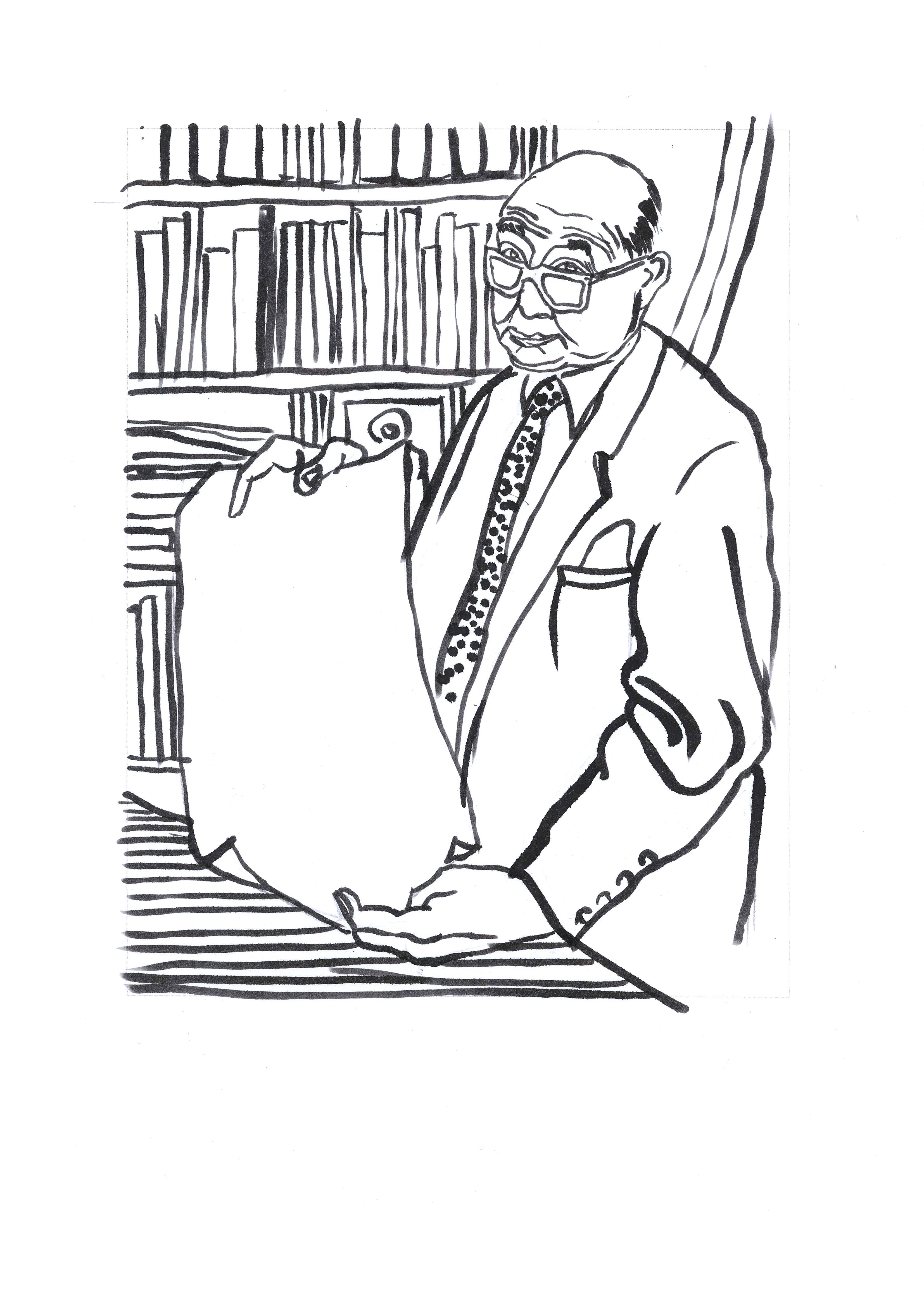 Jaśmina Wójcik, artwork R-302/I from the series "Zygmunt Stępiński"